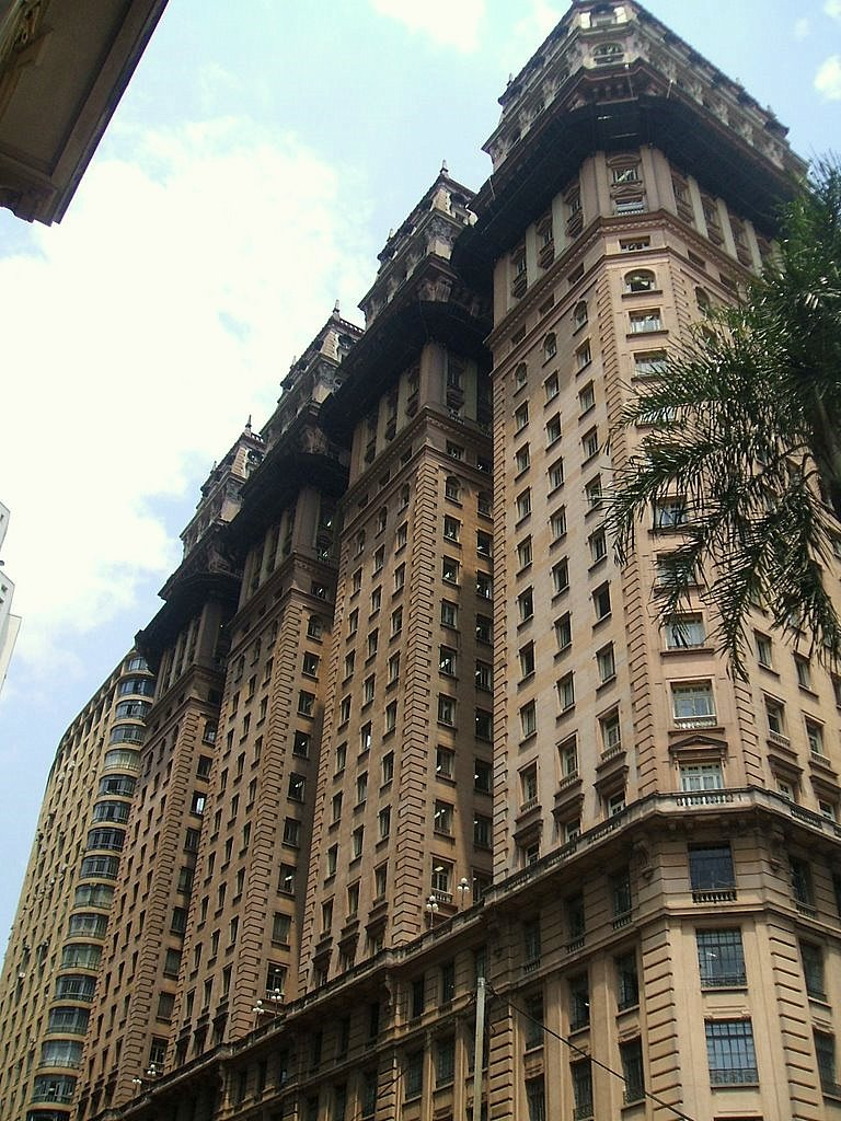 Edifício Martinelli, em São Paulo, Brasil